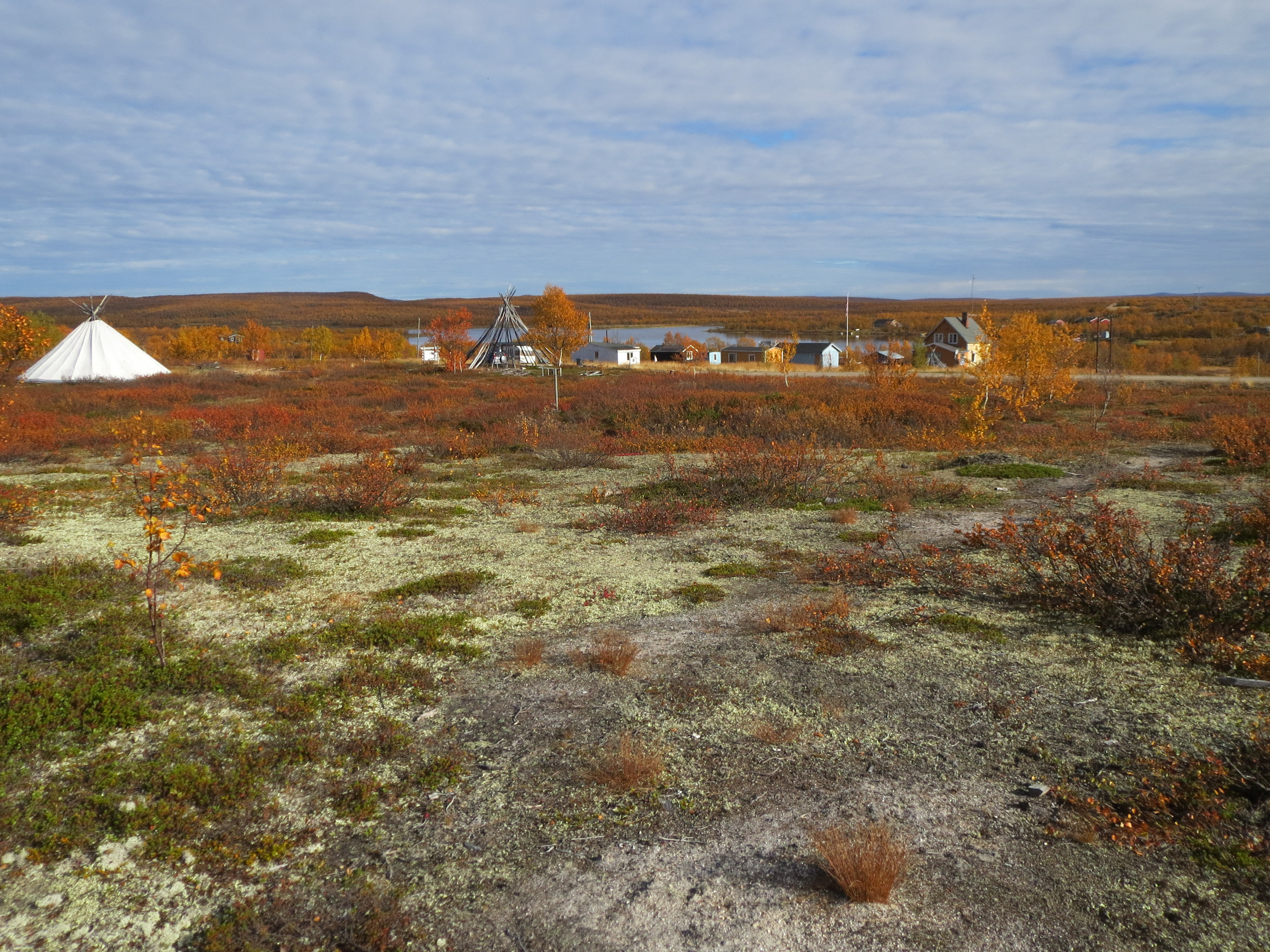 Cunovuohppi Sami village, Kautokeino, Norway